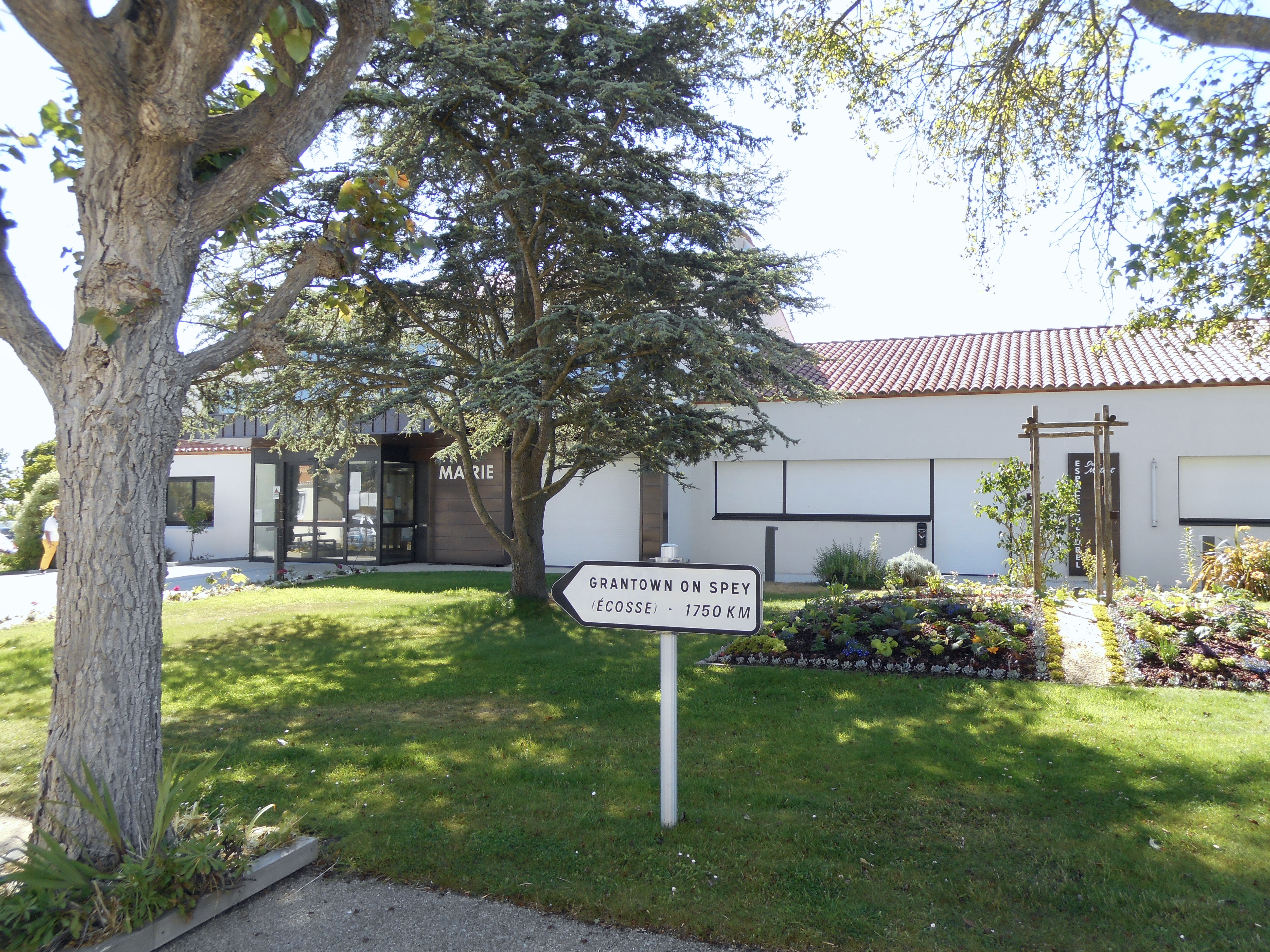 Mairie de Notre-Dame-de-Monts (2019)